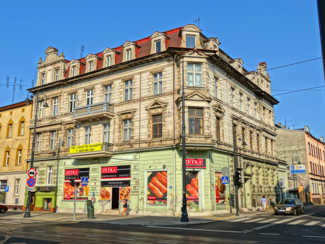 Kamienica na rogu ul. Gdańskiej i Chocimskiej w Bydgoszczy